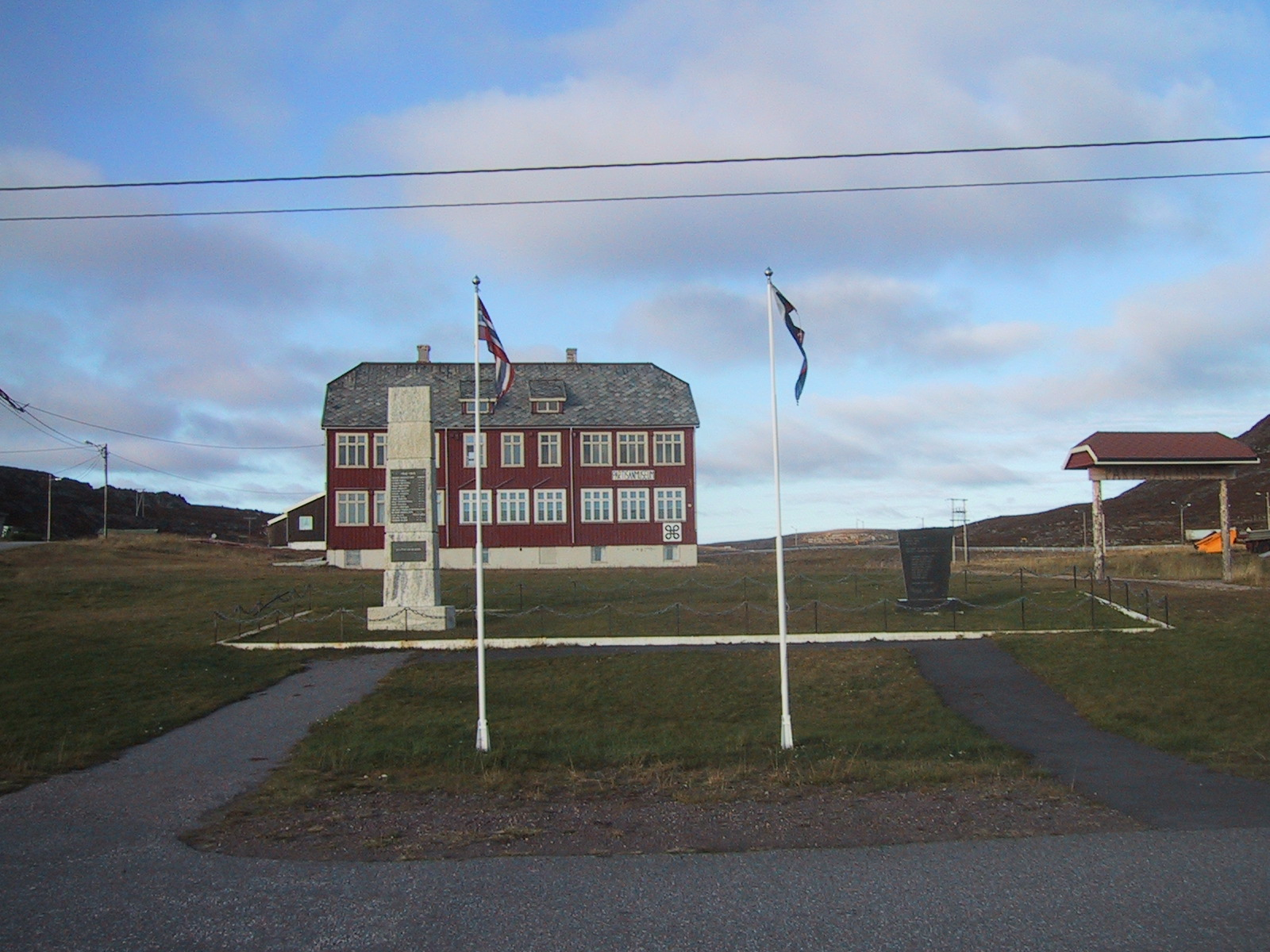 Partisanmuseet med minnestøtte for dei falne framom. Kiberg.